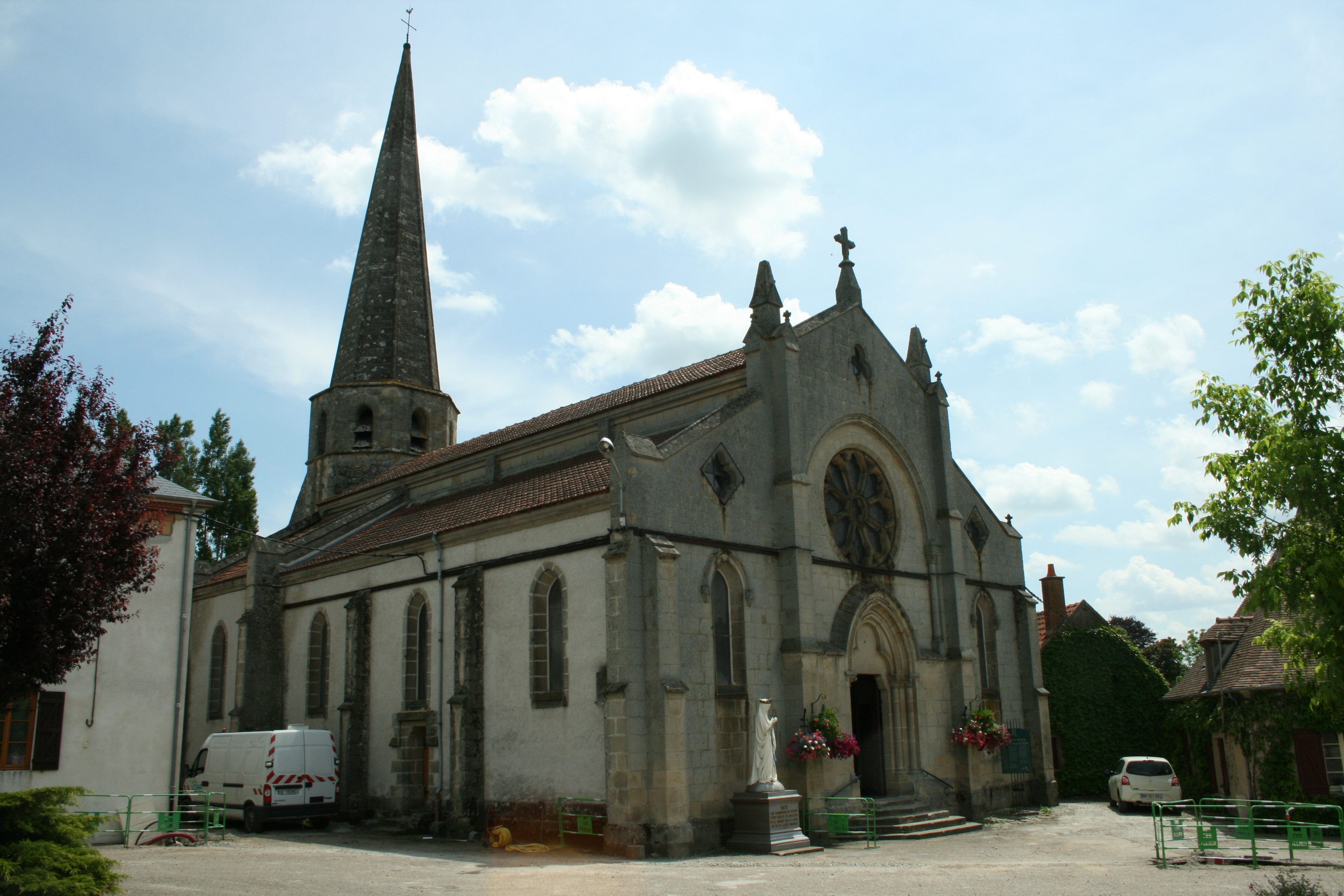 L'église Saint Martin (1851) de Noyant d'Allier.